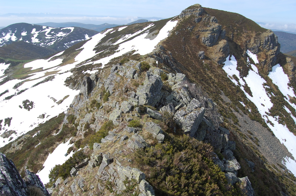 Tres Bispos, Ancares. Cervantes, Galiza